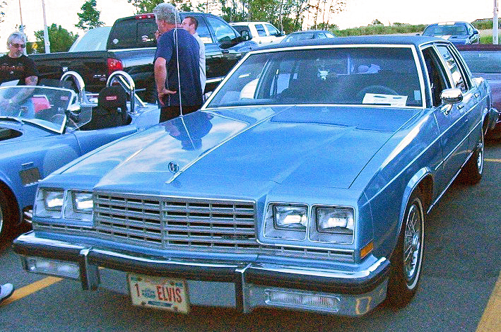 1981 Buick LeSabre photographed in Vaudreuil-Dorion, Quebec, Canada at the Auto classique Bellepros Vaudreuil-Dorion.